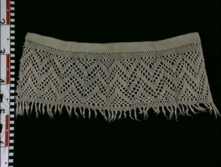 Firflettet bord fra Hallingdal, Buskerud.